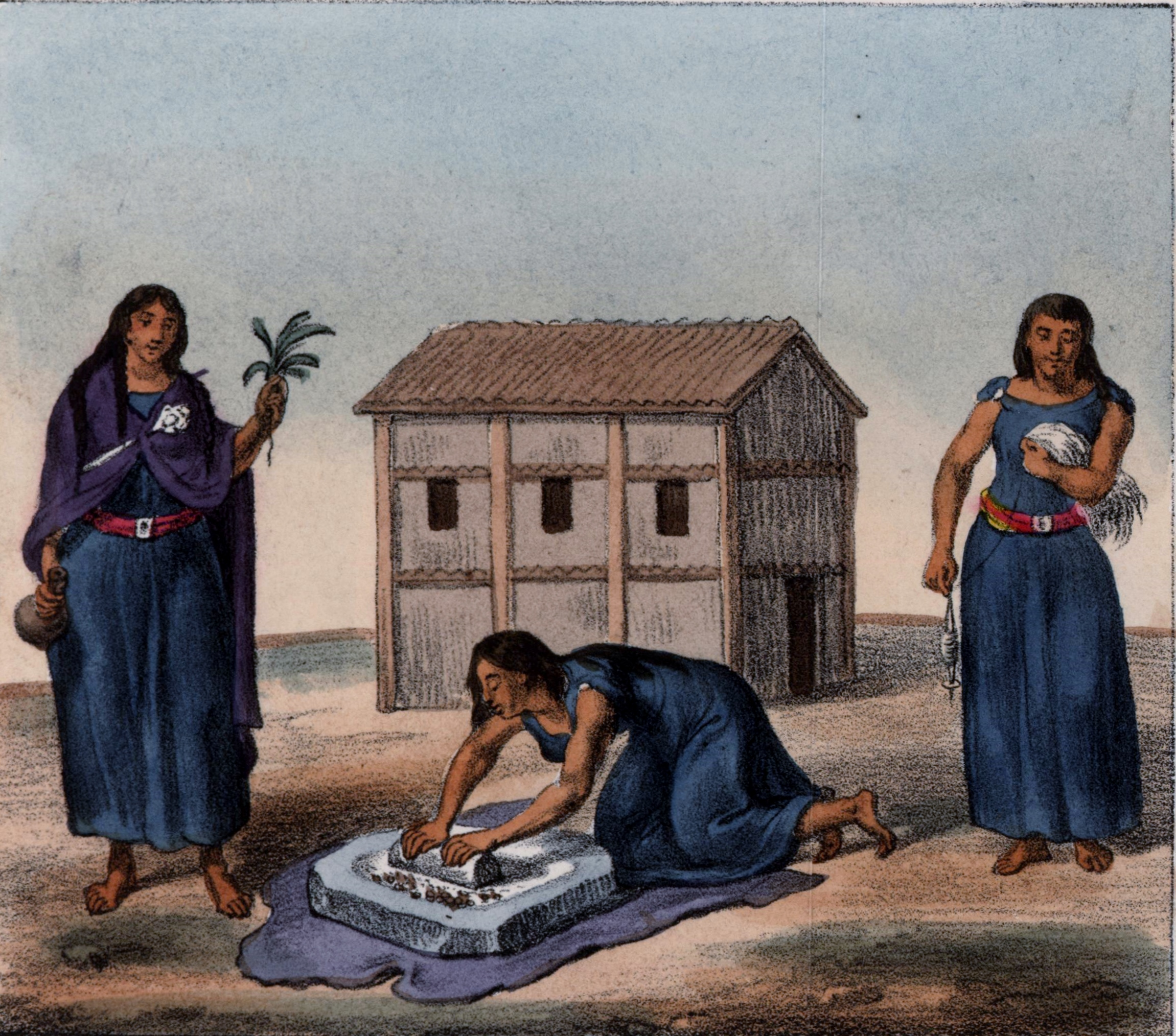 Mujeres mapuche; de izquierda a derecha: sosteniendo una calabaza/jarra y una planta o rama; moliendo maíz, desmadejando con un huso. Litografía coloreada de George Johann Scharf en una página plegada con otros grabados, según diversos bocetos (no se especifica quiénes son los autores de esos bocetos); impresa por Rowney & Forster y publicada por Peter Schmidtmeyer en su libro Travels into Chile, over the Andes, in the years 1820 and 1821, London: Longman, Hurst, Rees, Orme, Brown and Green, 1824.